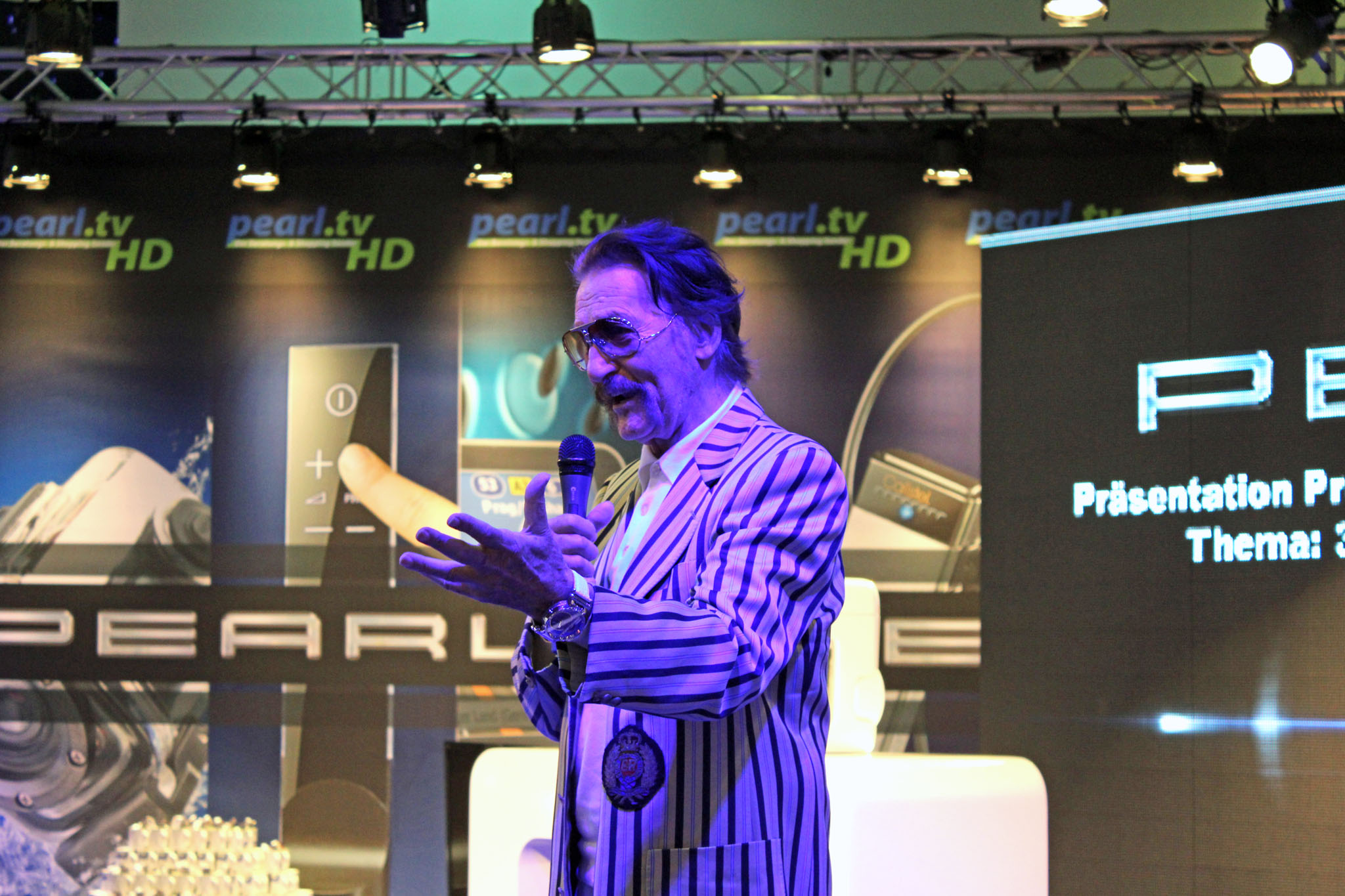 Luigi Colani at Internationale Funkausstellung 2013